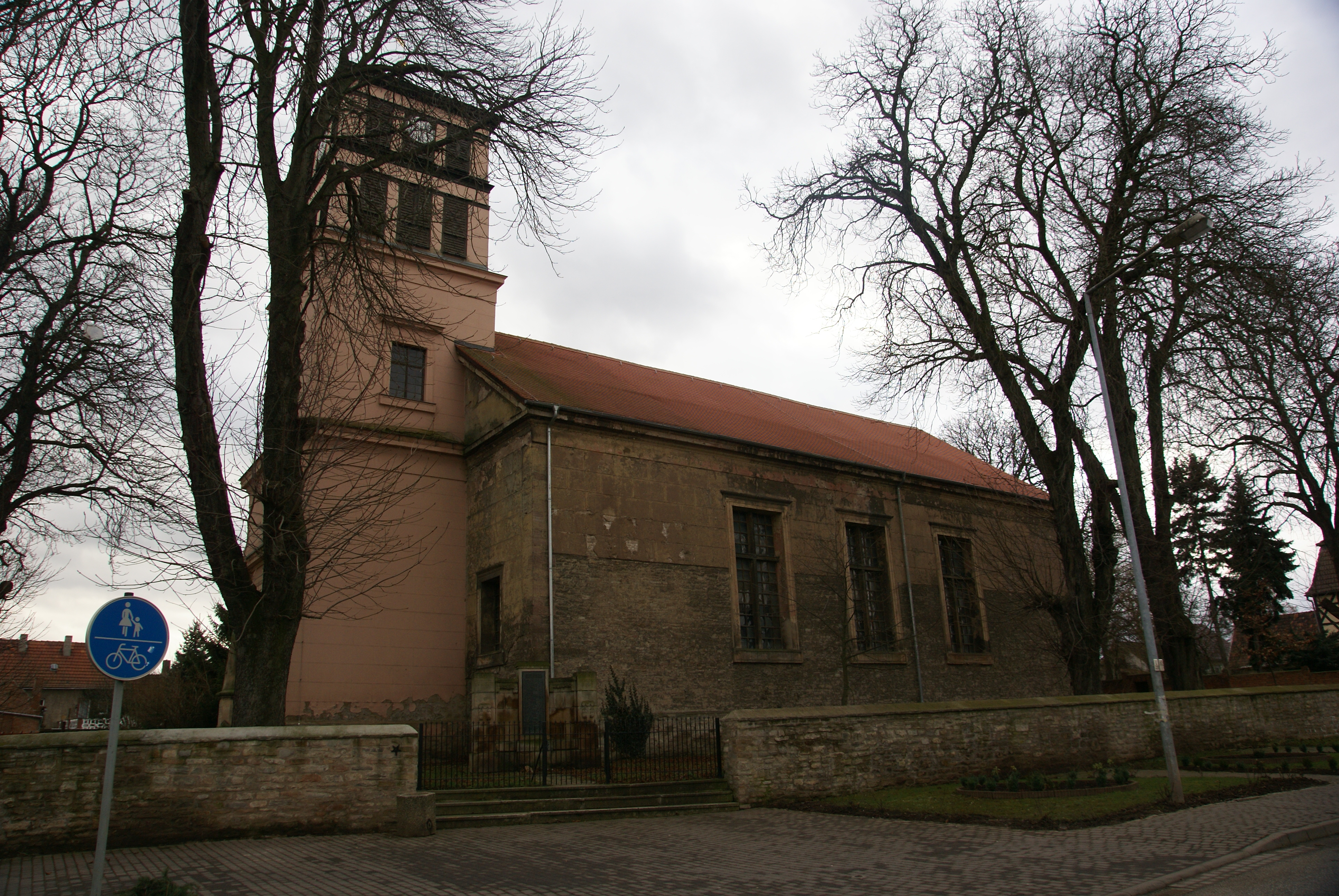 die Dorfkirche in Edersleben